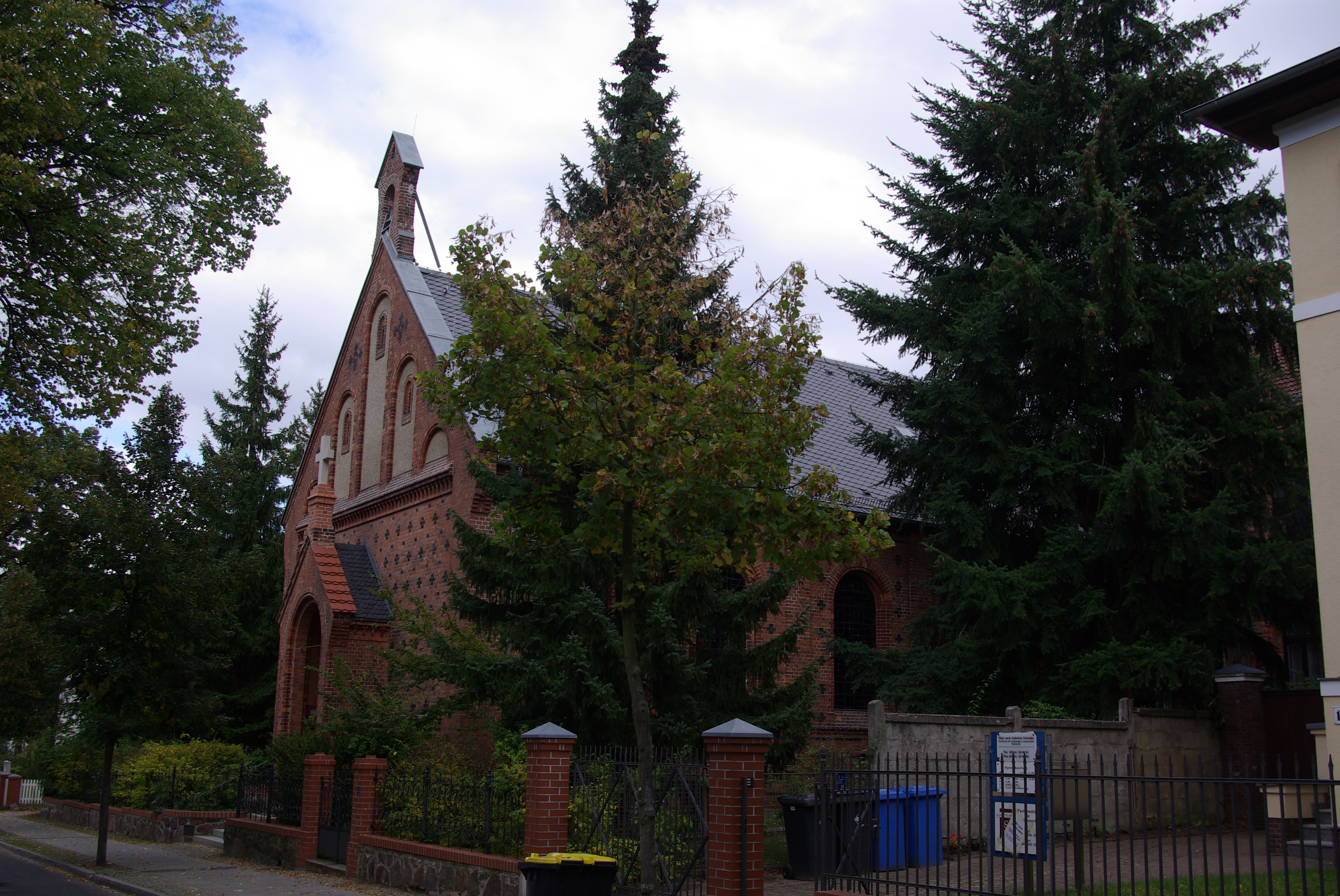 Bad Freienwalde in Brandenburg. Das Haus Goethestraße 12 steht unter Denkmalschutz.